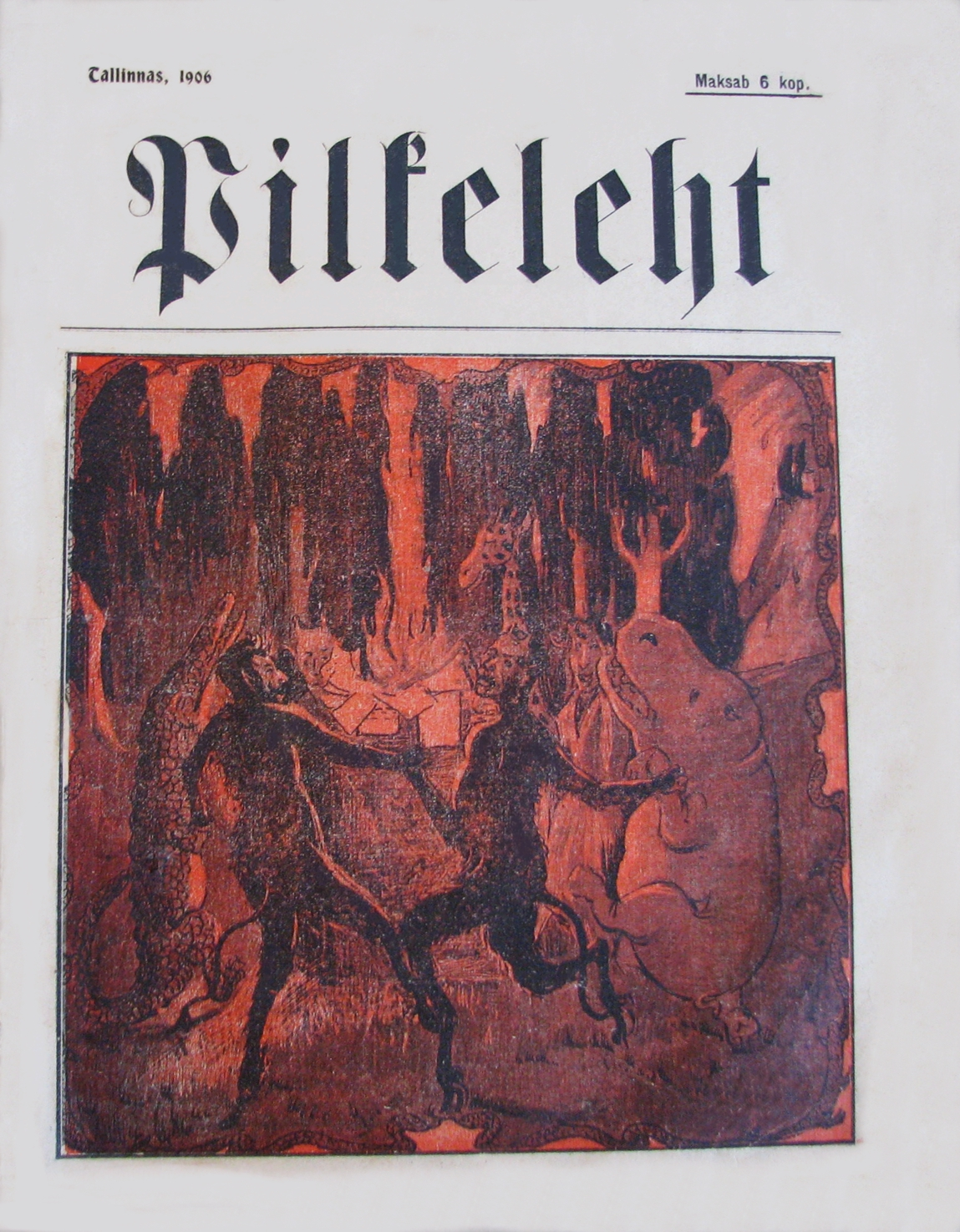 Ajaleht Pilkeleht, esileht